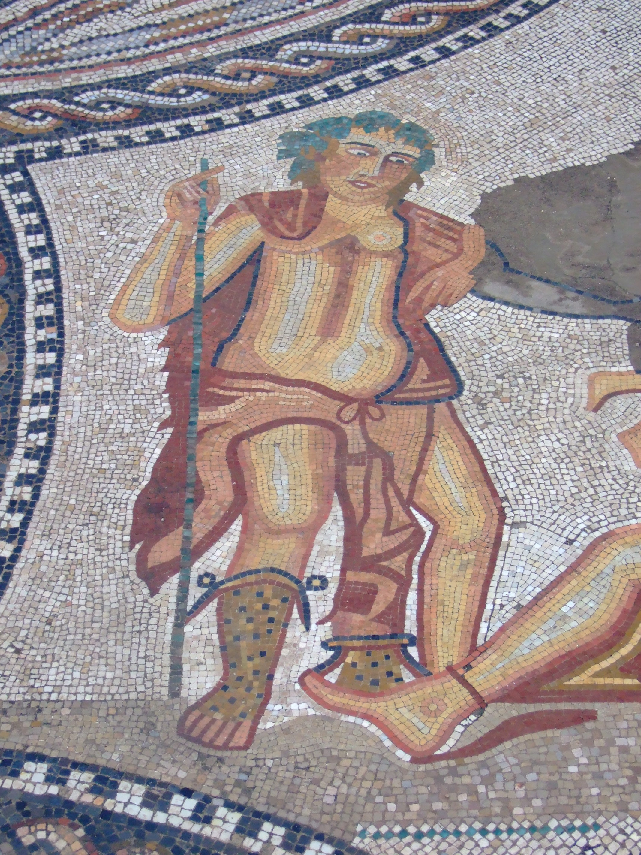 Volubilis (Maroc) Mosaïque de Bacchus et Cupidon